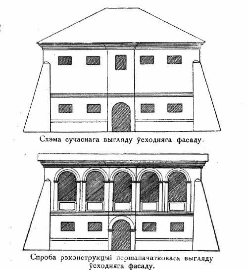 Беларуская (тарашкевіца): Замак вялікай княгіні Боны ў Рагачове